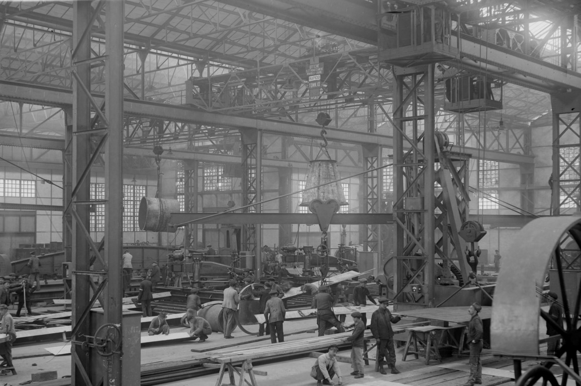 Interno dell'officina navale e operai a lavoro, 1917 (AS Livorno, Archivio storico del Cantiere navale Luigi Orlando)